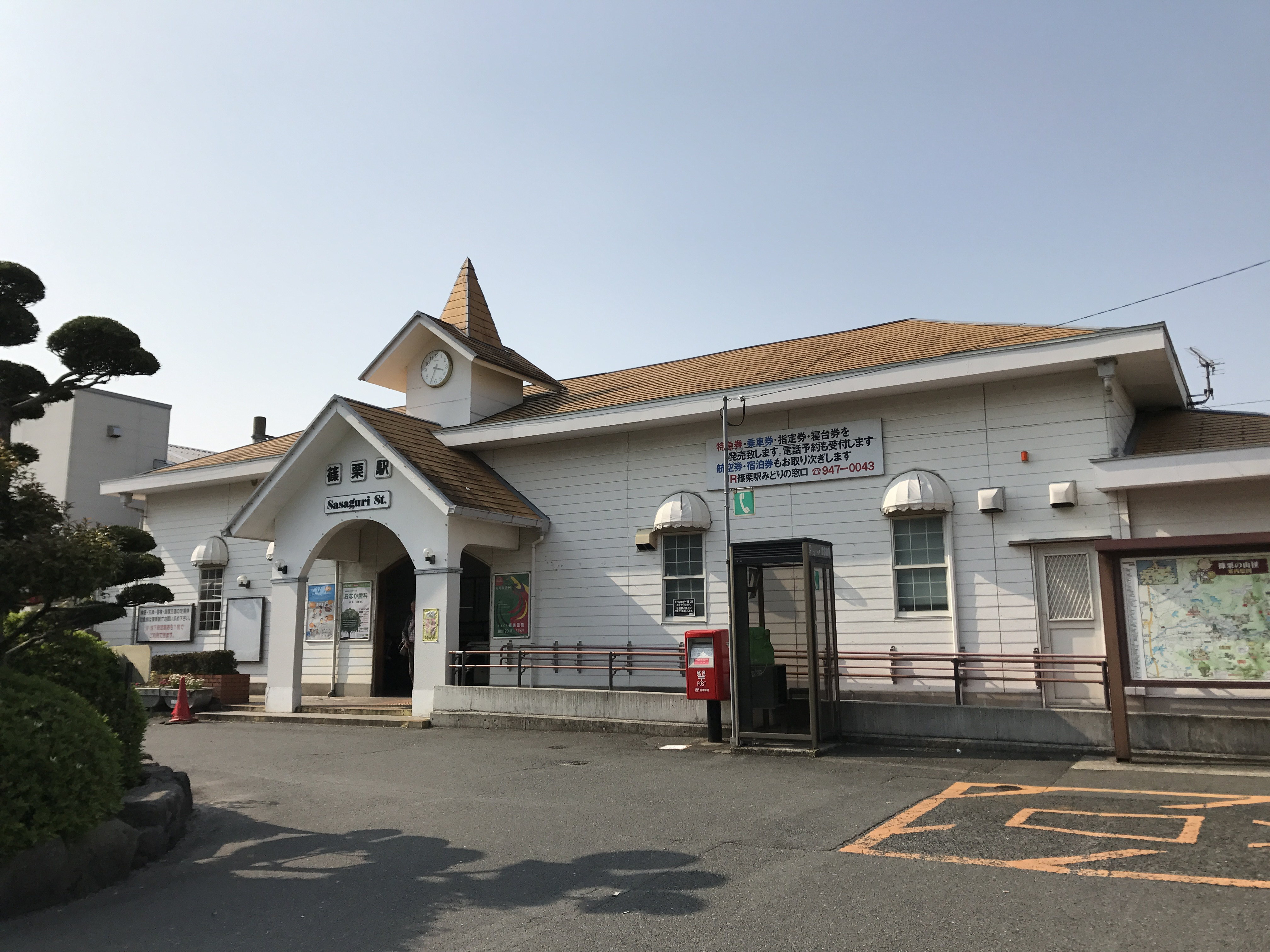 篠栗駅駅舎